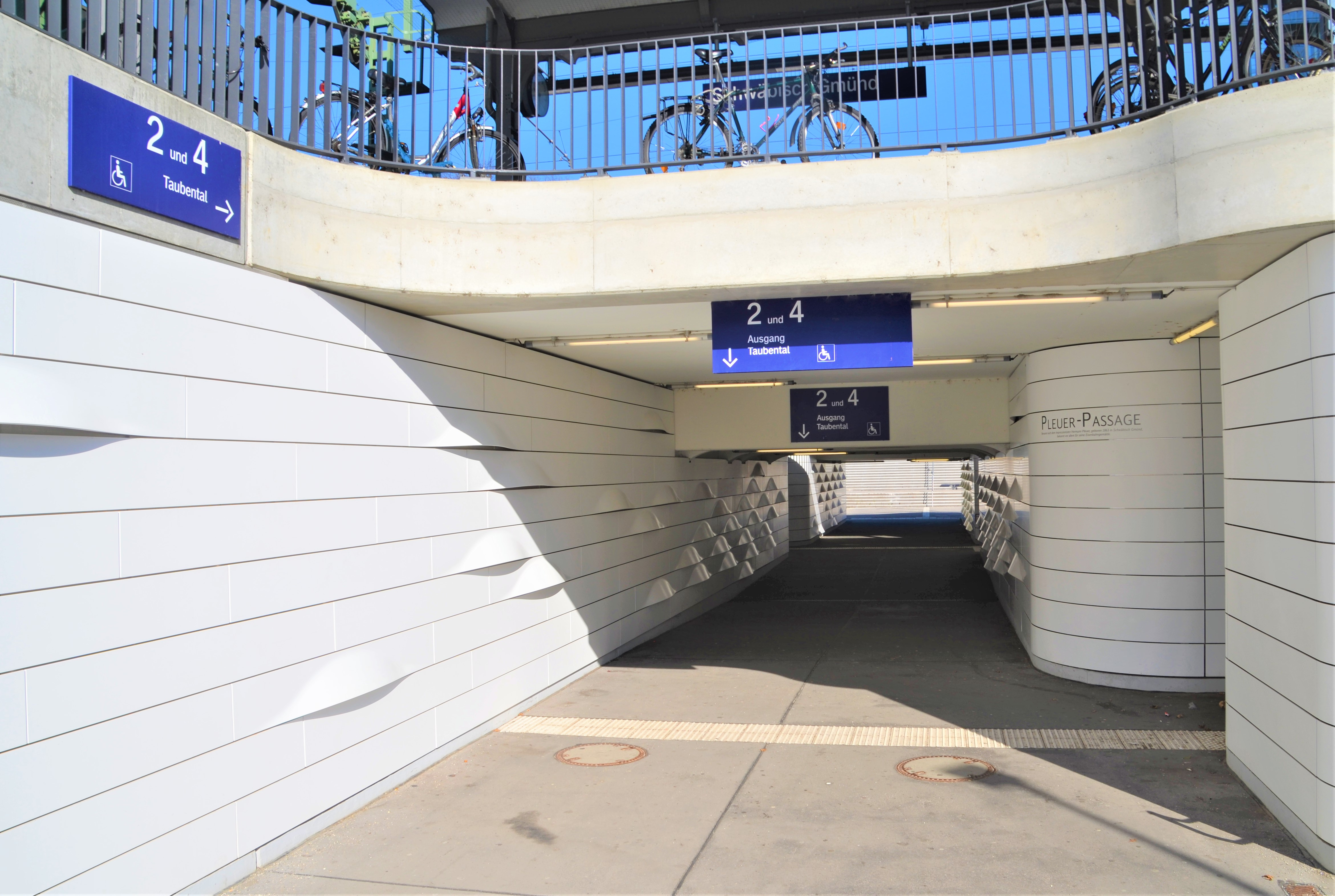 Bahnhof Schwäbisch Gmünd, Pleuerpassge vom Süden (vom Bahnhofsvorplatz kommend)